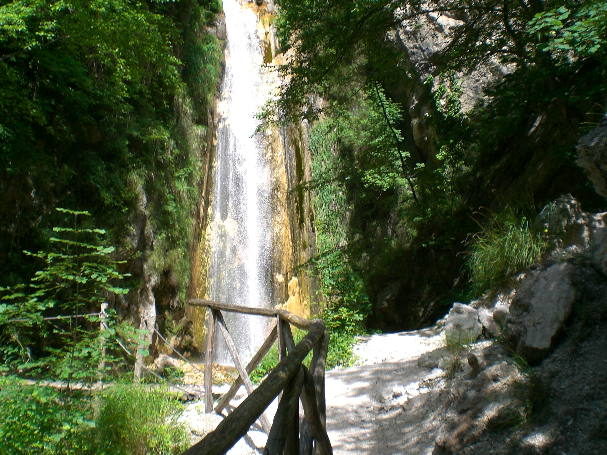 valle della Caccia